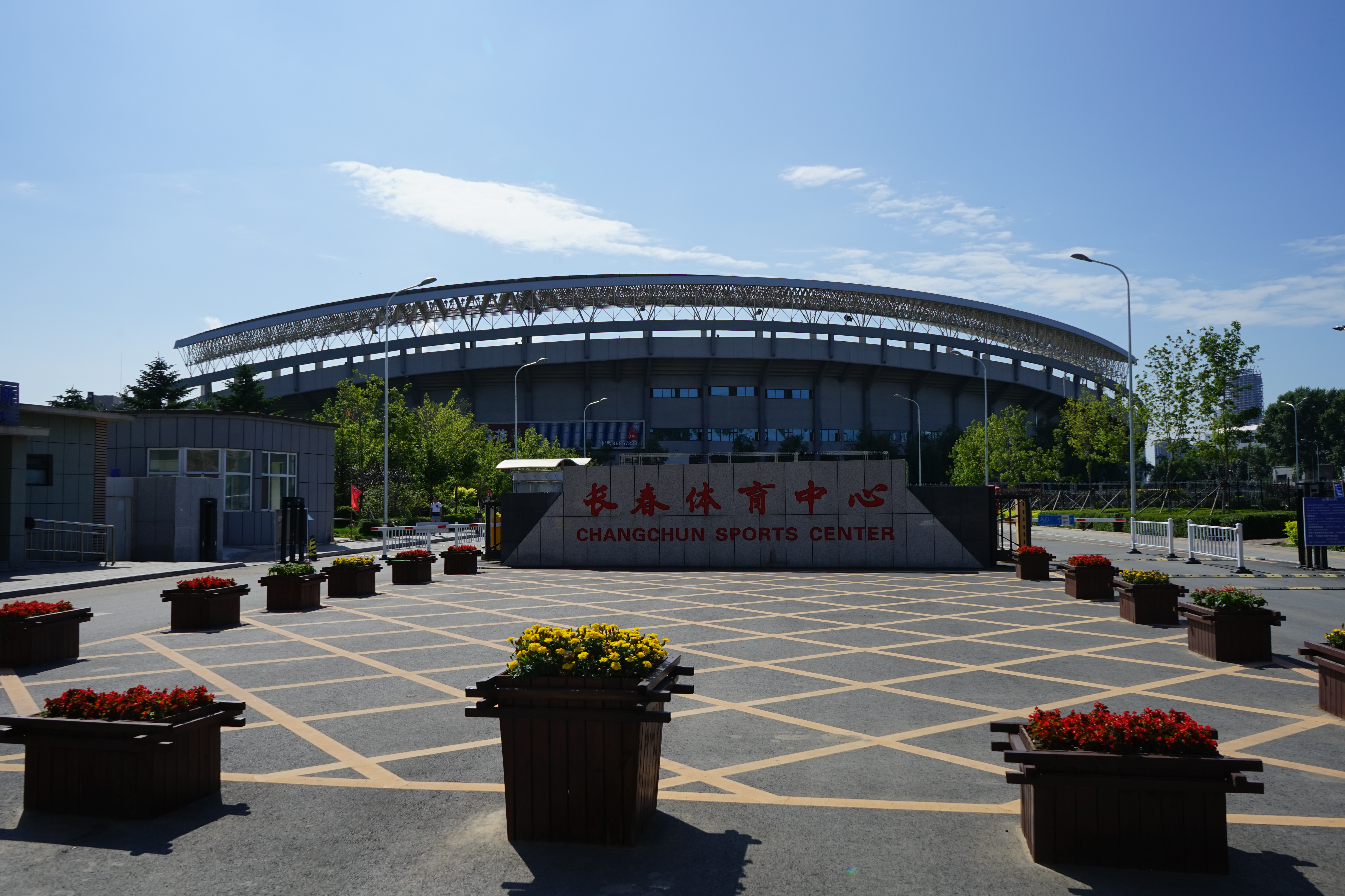 中文（中国大陆）: 长春体育中心